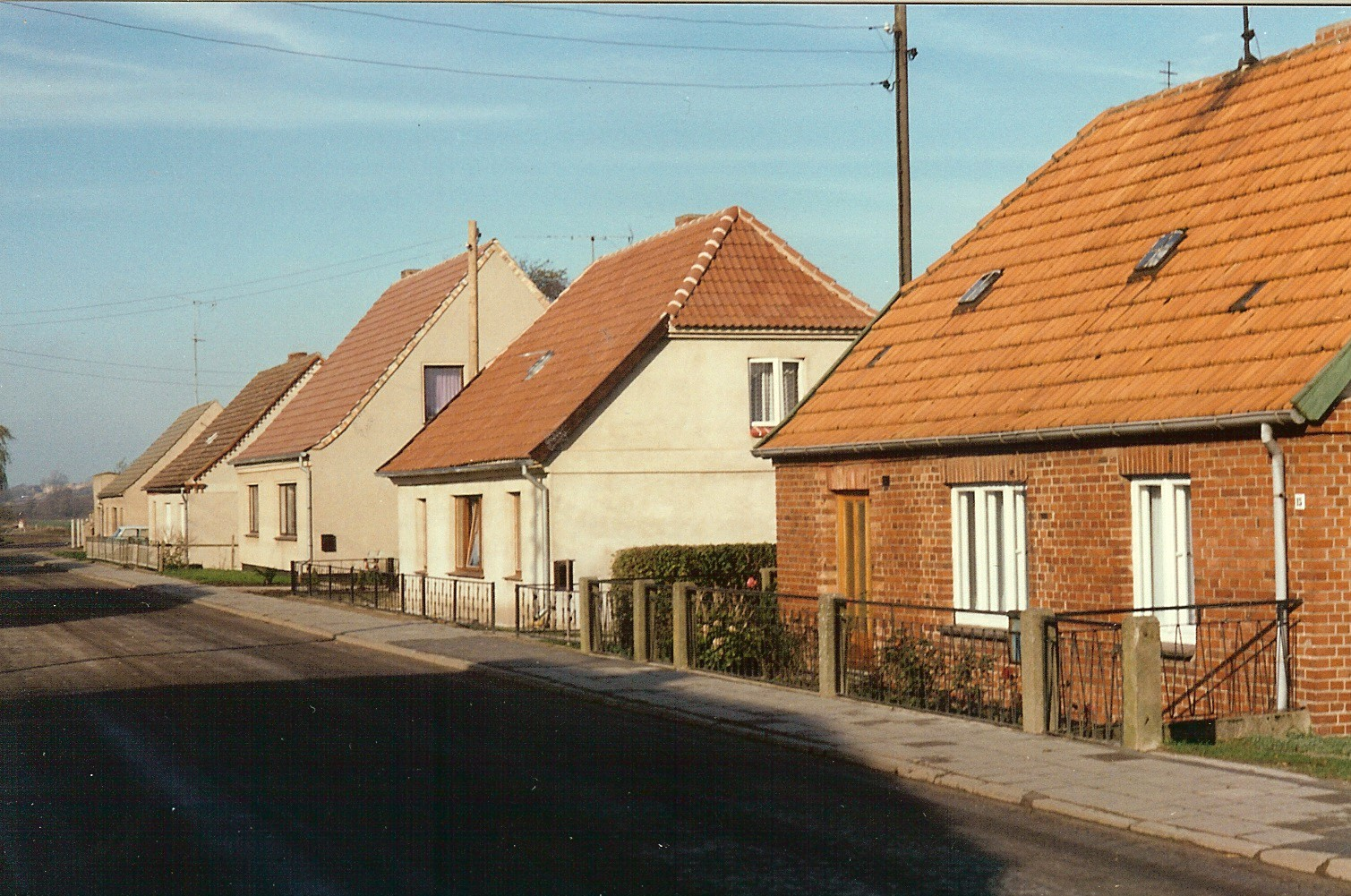 Straße in Groß Roge Anfang November 1989